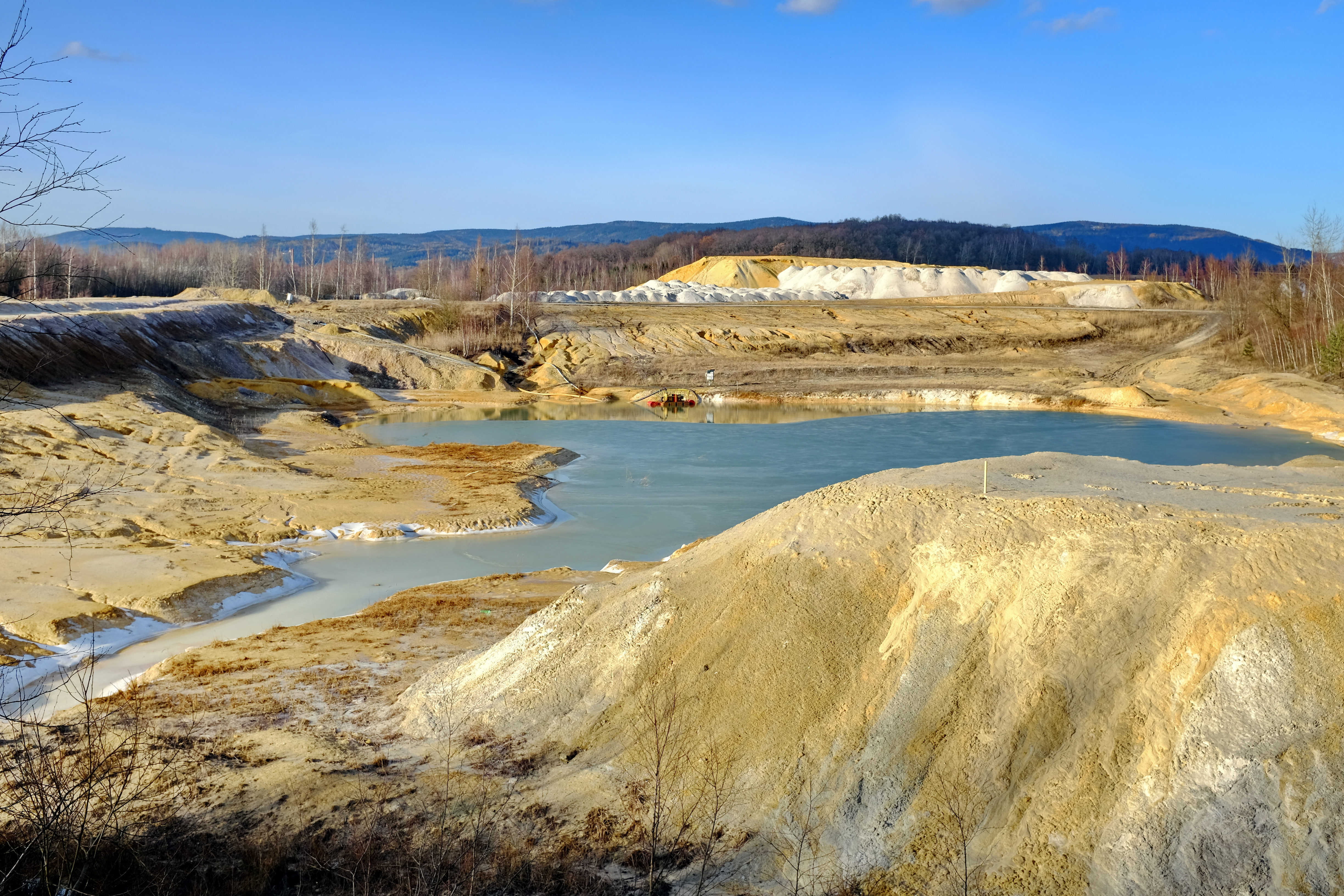 Jimlíkov, těžba kaolínu, okres Karlovy Vary